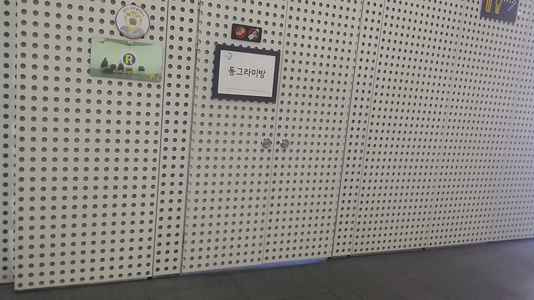 조선말: 서울 시민청 동그라미방